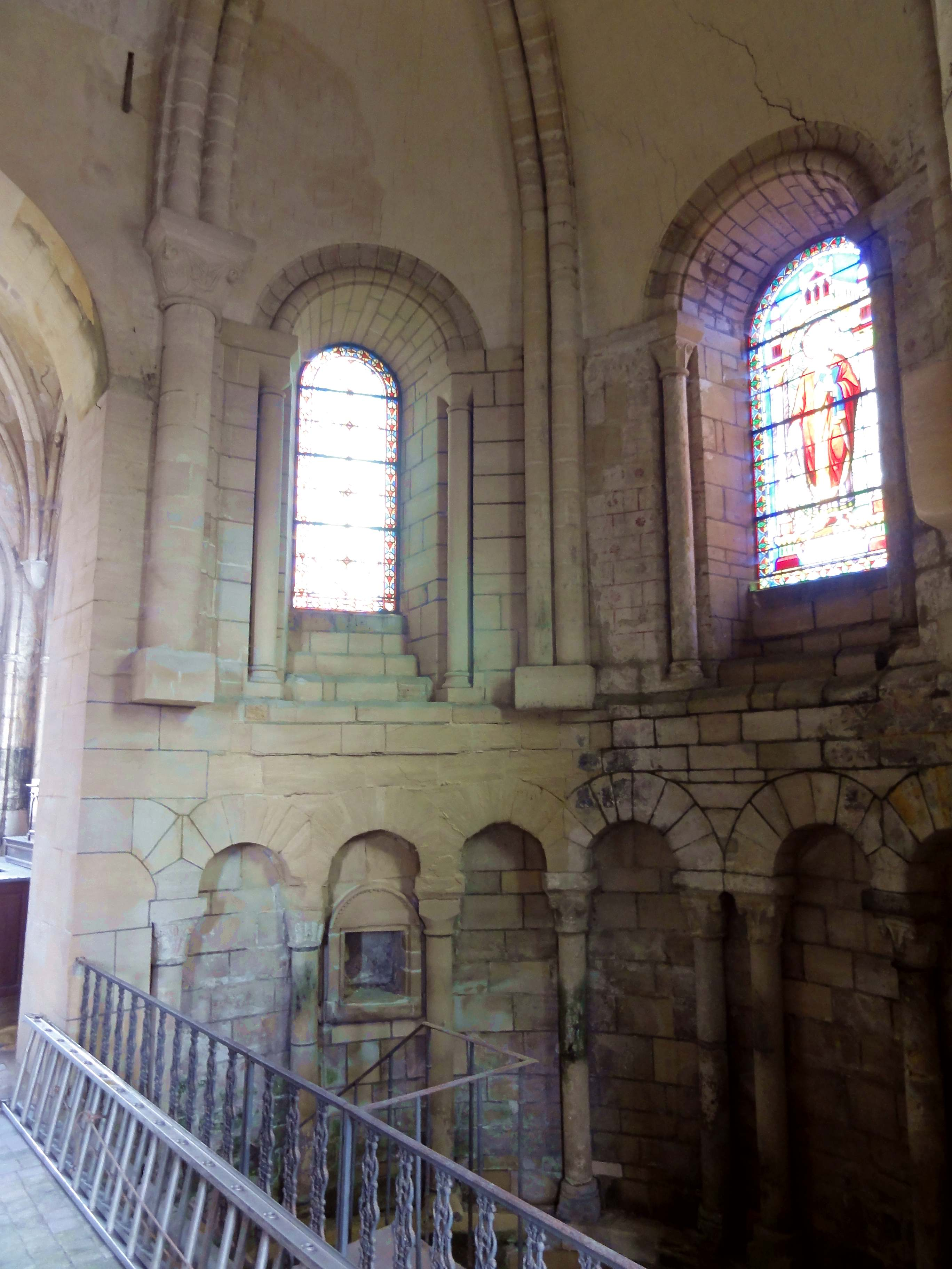 Intérieur de l'église - voir le titre du fichier.